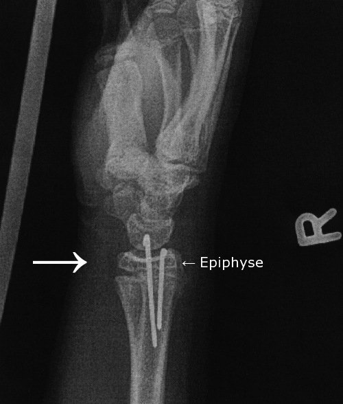 Handgelenk eines 13-jährigen Jungen, auf Papier ausgedrucktes und wieder eingescanntes Röntgenbild. Zustand nach Epiphysiolyse der Radius-Epiphyse und anschließender Osteosynthese mittels Kirschnerdrähten. Die Nativaufnahme (vor der Operation) findet sich hier unter dem Namen Radius-epiphysiolyse01.jpg.